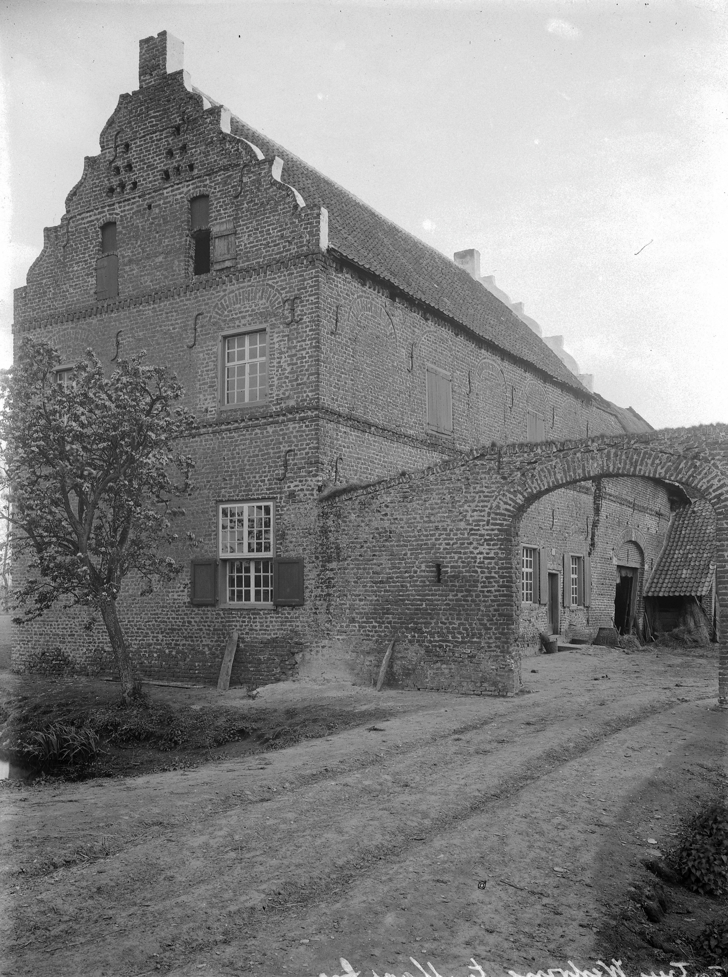 Huize De Westering: Zijgevel met toegangspoort